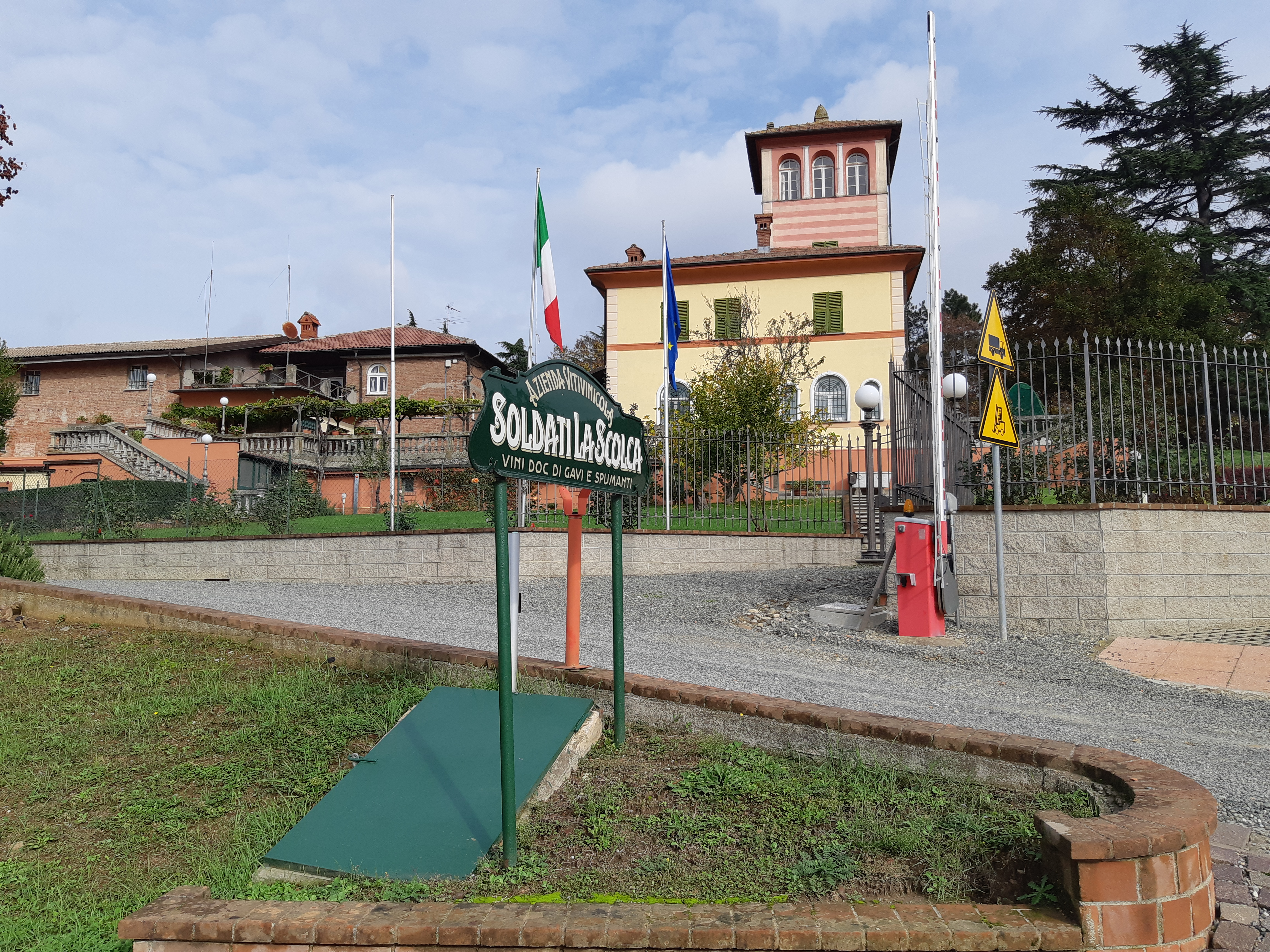 Eingang Weingut La Scolca Gavi (Italy) 2019